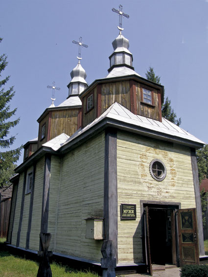 Церква із села Сухий Яр у Музеї народної архітектури та побуту Середньої Наддніпрянщини